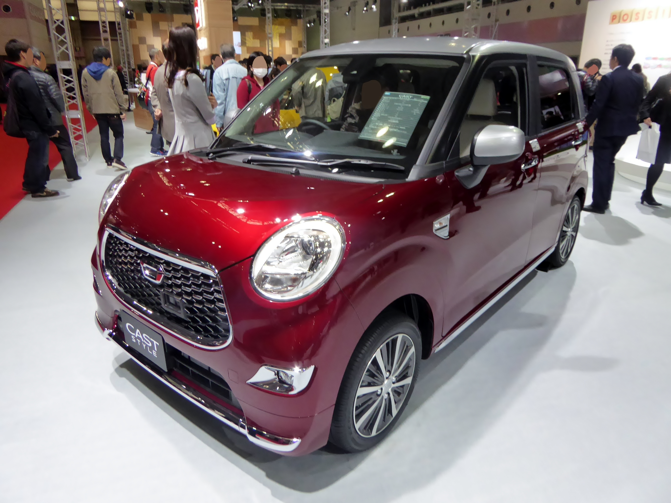 大阪モーターショー2015においてDBA-LA250S型ダイハツ・キャストスタイルG"SA II"を撮影。